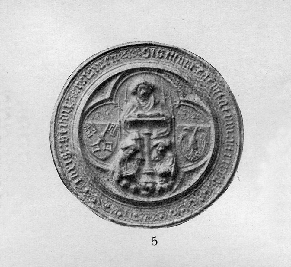 Siegel der Juristischen Fakultät Köln von 1393. Das Siegel in runder Foerm hat im Original einen Durchmesser von 52 mm. Die durch Ranken unterbrochene Umschrift in deutschen Minuskeln lautet: sigillum facultatum utriusq… iuris studii colon[iensis].